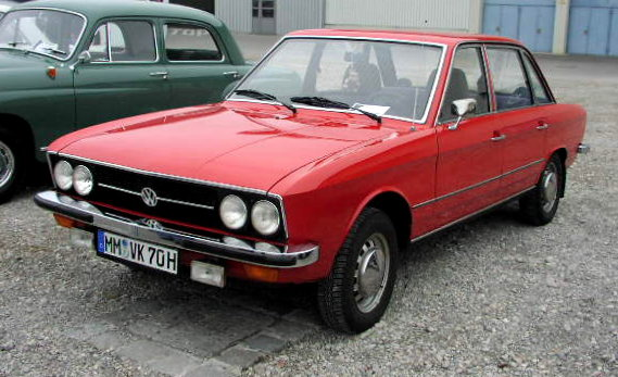 Volkswagen K 70 S